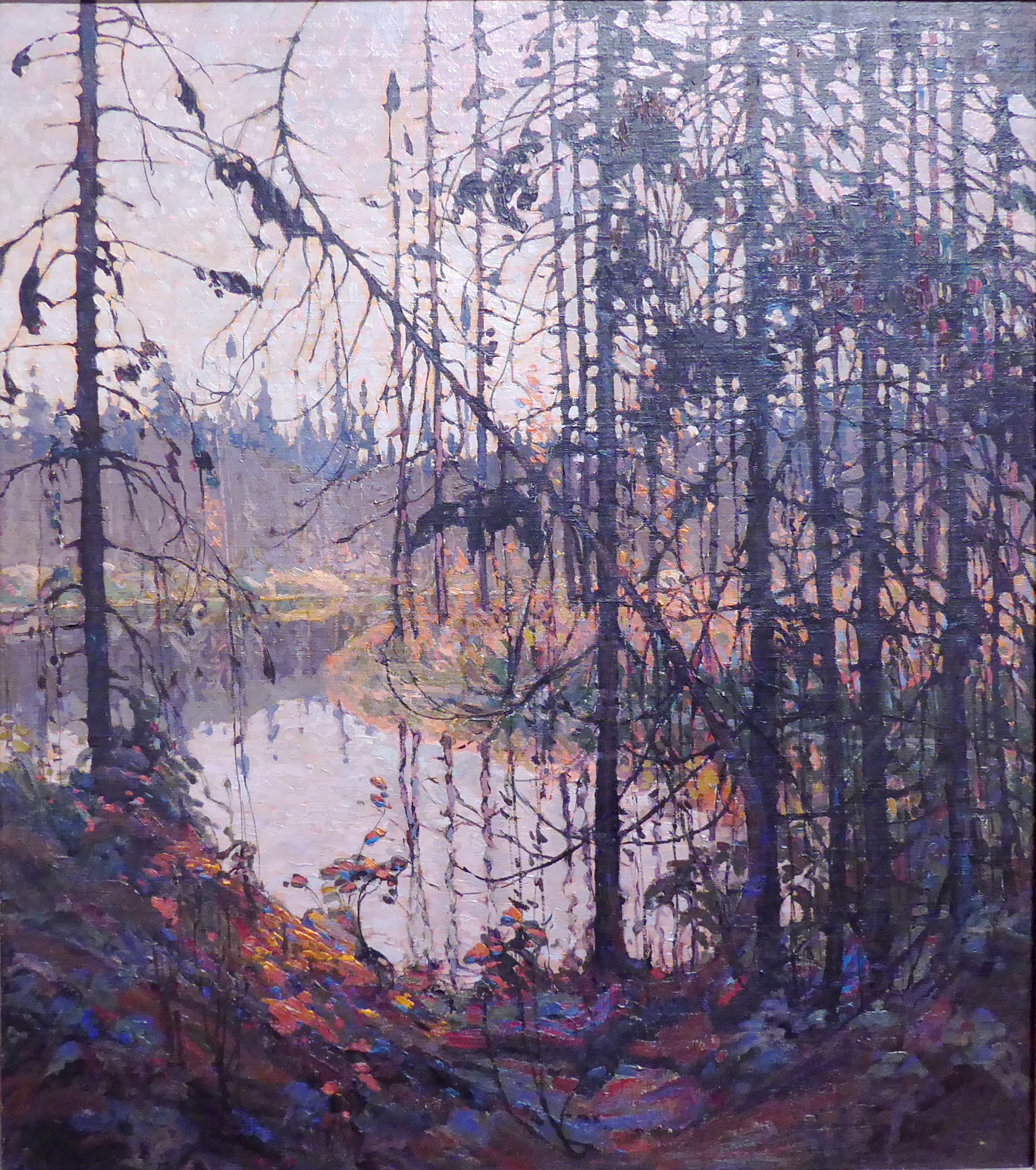 Peinture de Tom Thomson